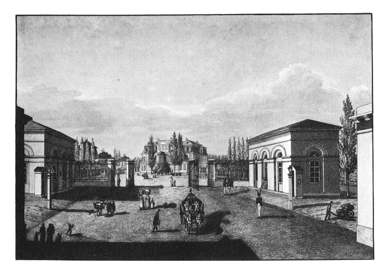 Ansicht des Friedberger Thors zu Frankfurt a.M.